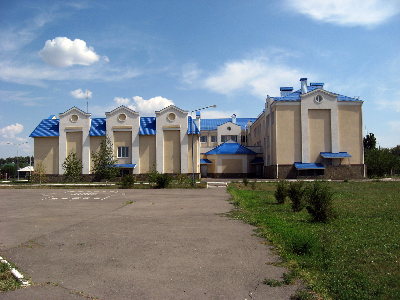 Школа №32, посёлок Целина, Целинский район, Ростовская область.